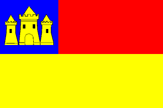 Vlag van de voormalige Zuid-Hollandse gemeente Haastrecht